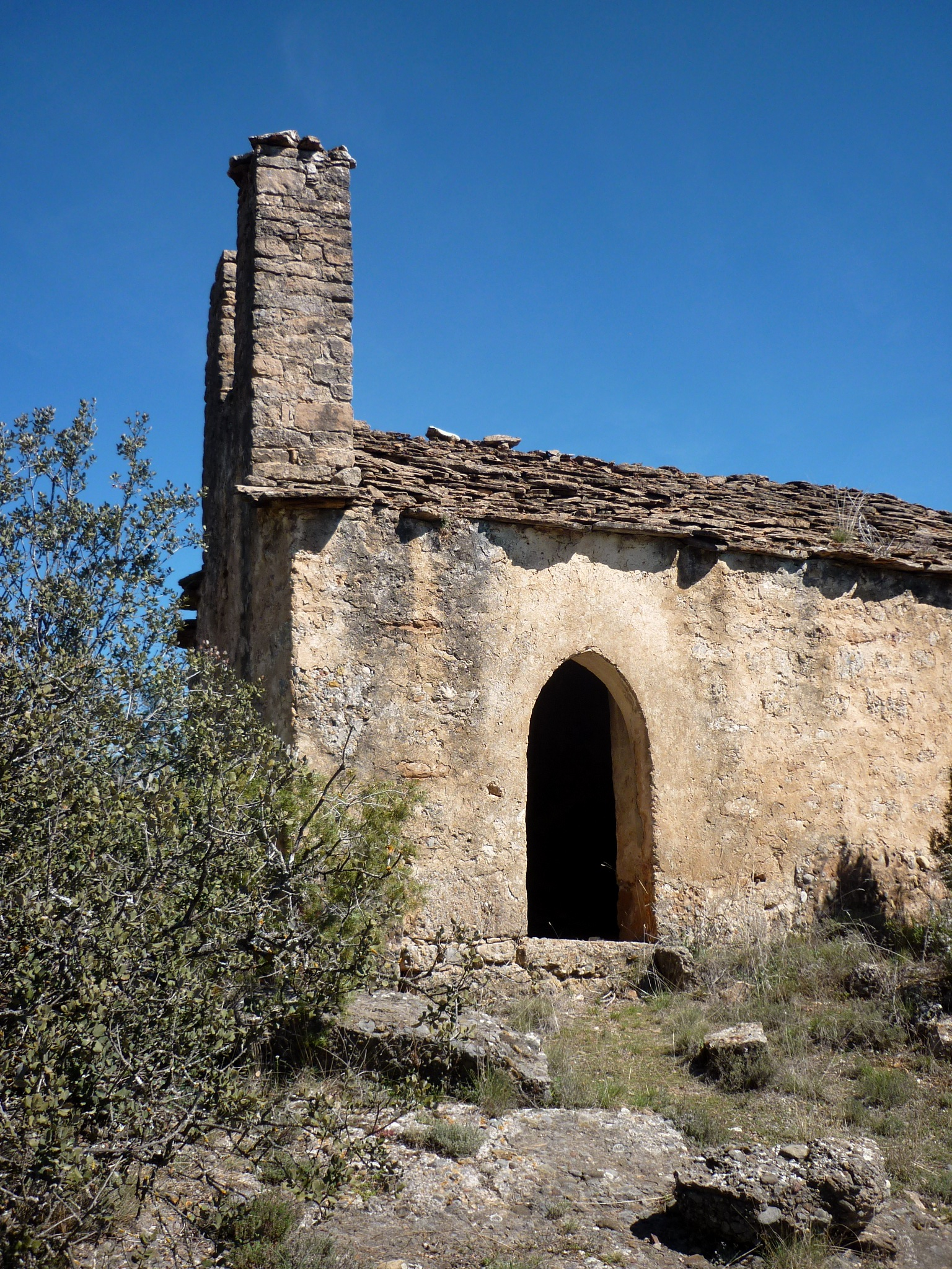 Sant Salvador del mas Barrat (la Baronia de Rialb): portal i espadanya